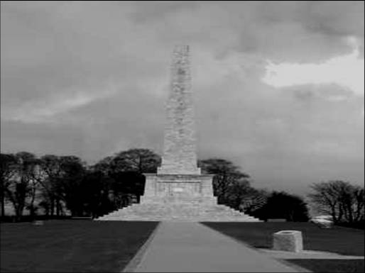 Robert Ross Monument